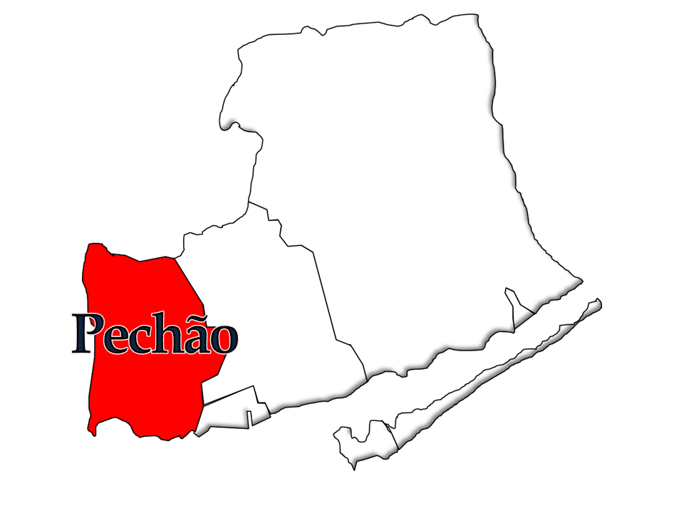 Cenos 1864/2011